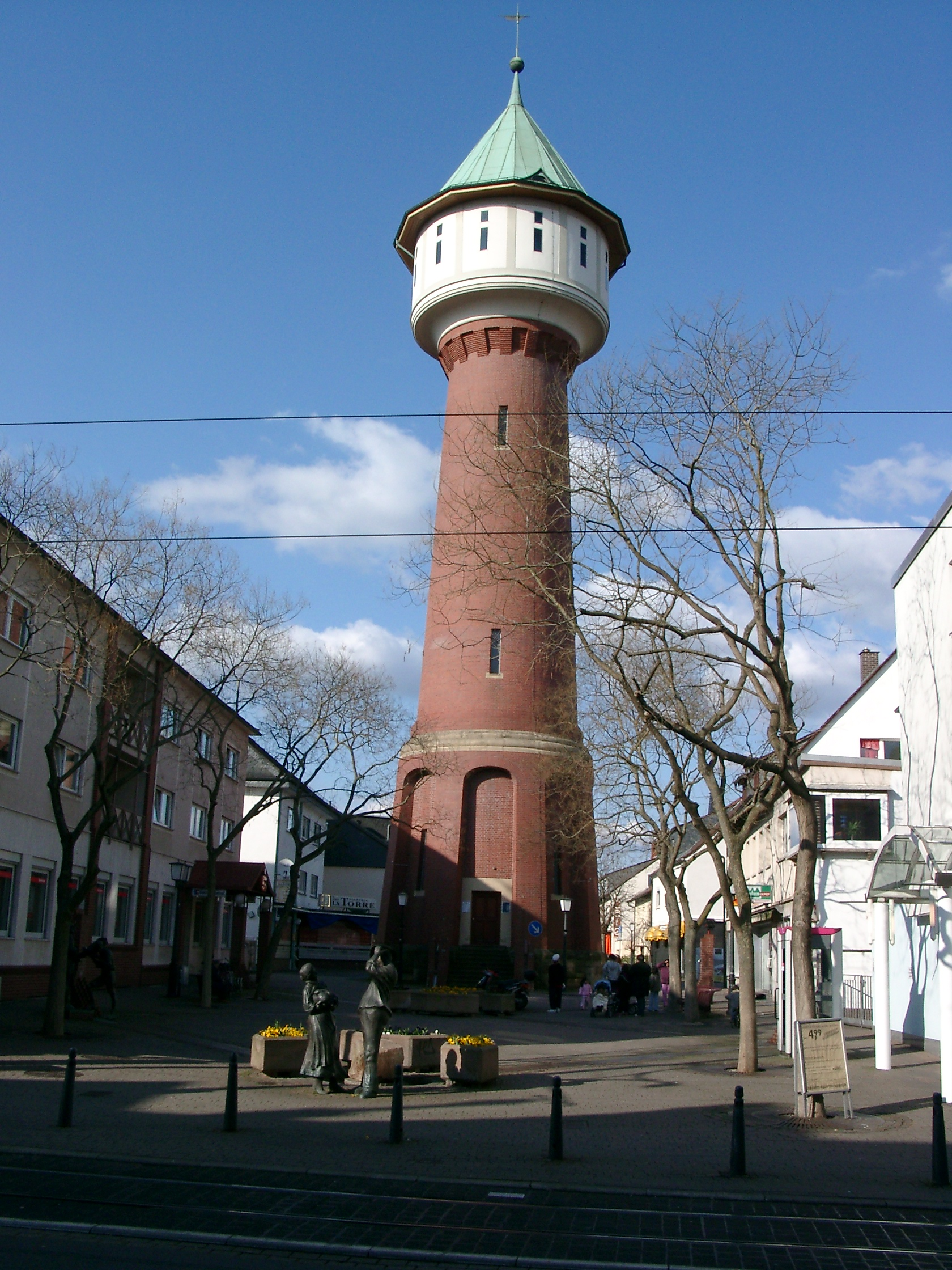 Eppelheim, Wasserturm